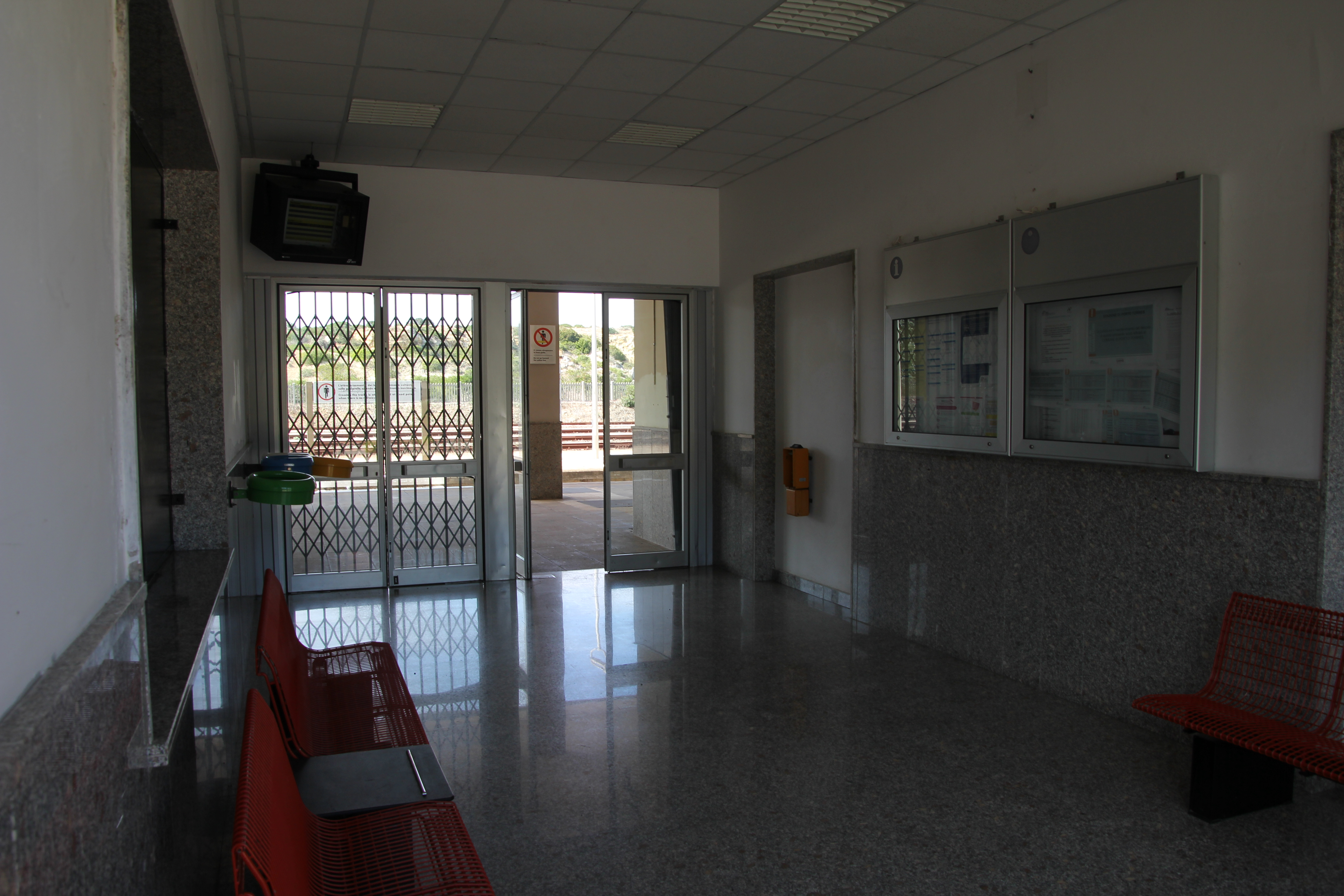 Porto Torres, stazione ferroviaria